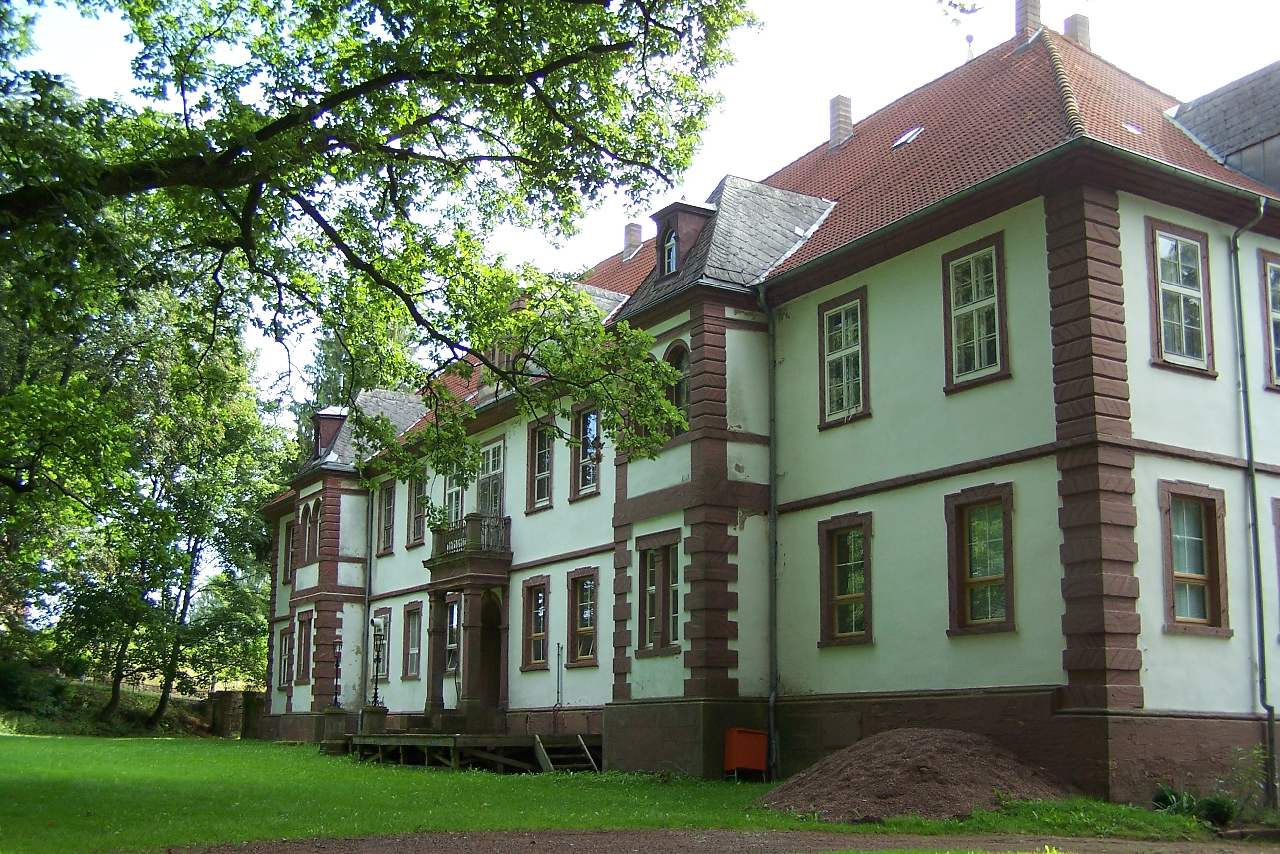 Ansichten und Details zum Oberen Schloss in Gehaus.